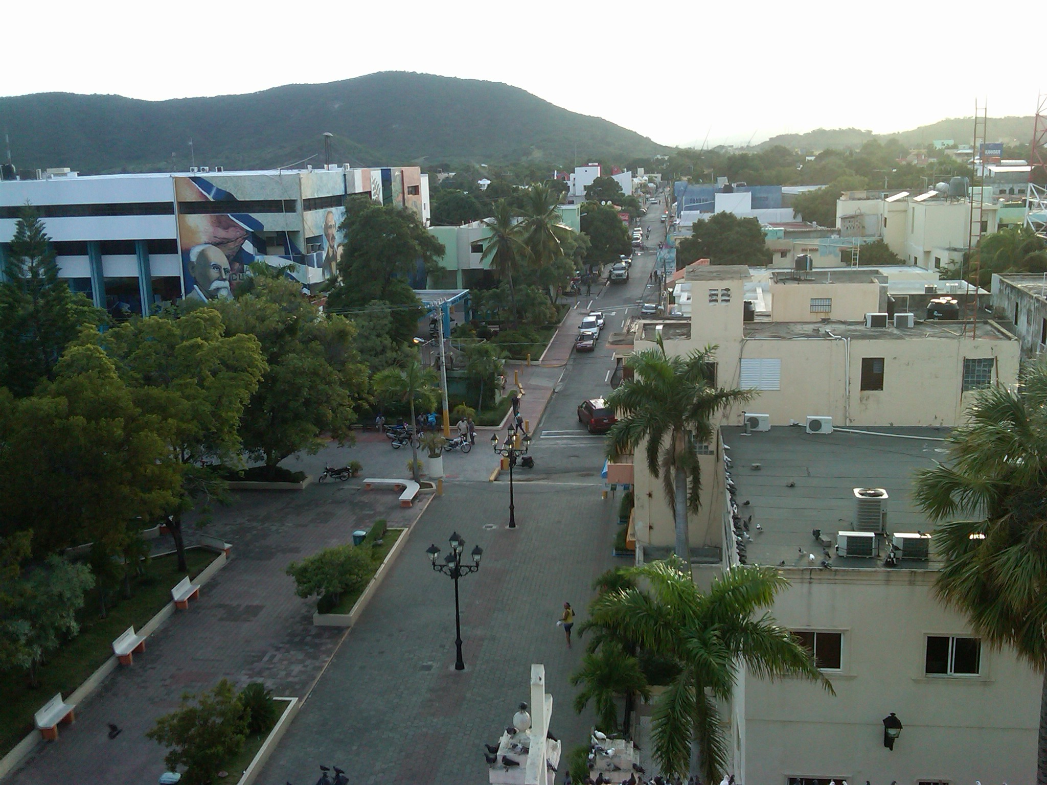 Zona Central y Oeste de Baní